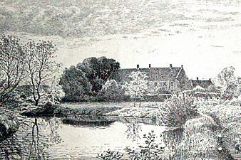 Esrom Kloster. Bygningen bestaar delvis af Levninger af det Cistercienser Kloster, som opførtes her 1153.